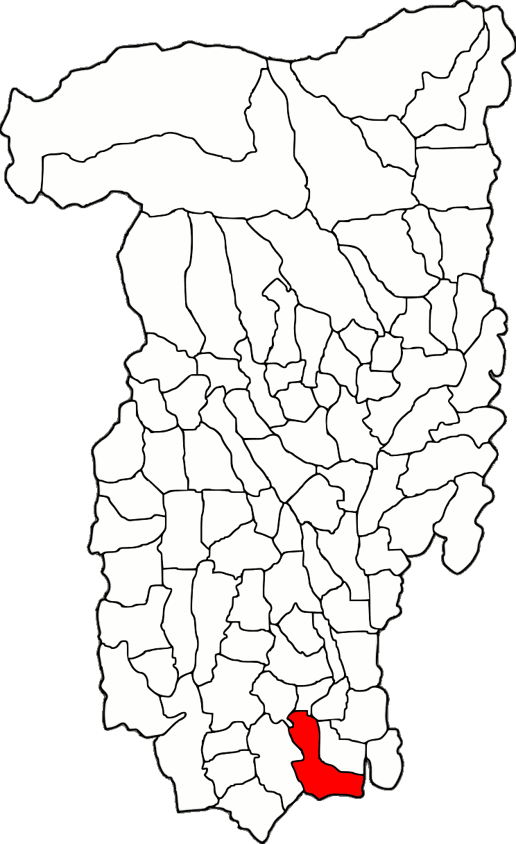 Lage der Gemeinde Lungești im Kreis Vâlcea (RO).